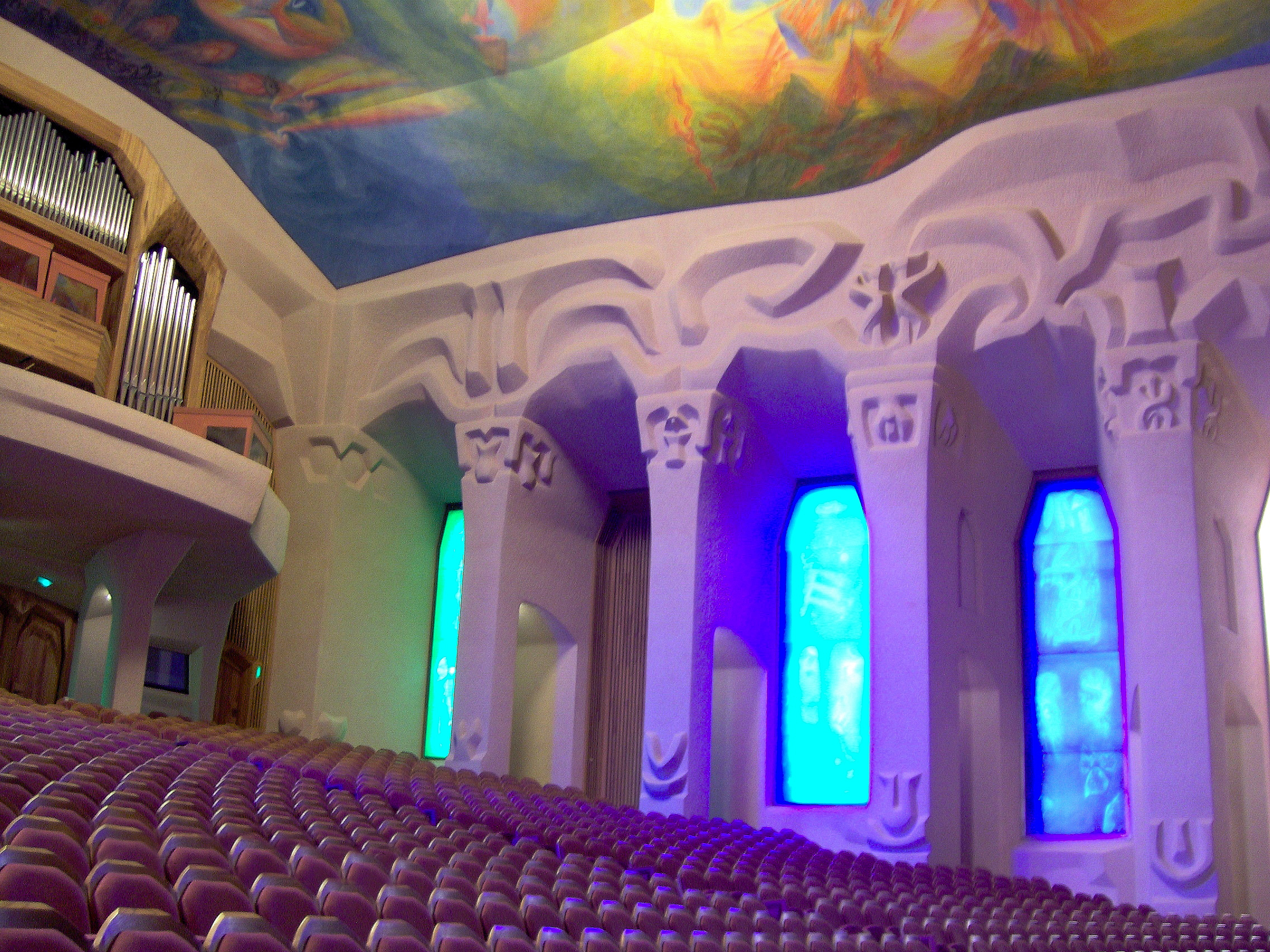 Goetheanum in Dornach. Die farbigen Glasfenster erzeugen wunderbare Lichtspiele